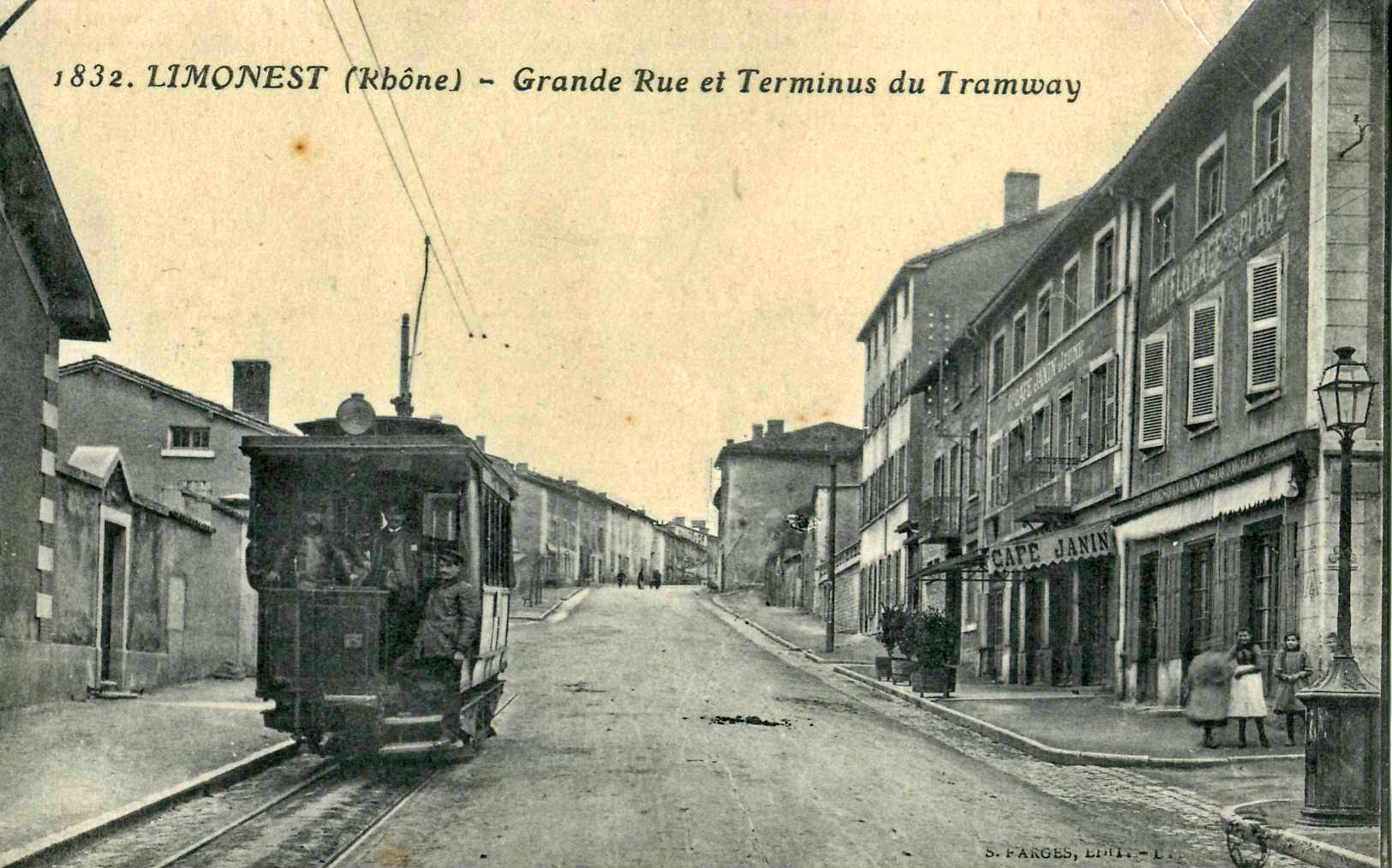 Carte postale ancienne éditée par S. Farges, n°1832 : LIMONEST - Grande Rue et Terminus du Tramway